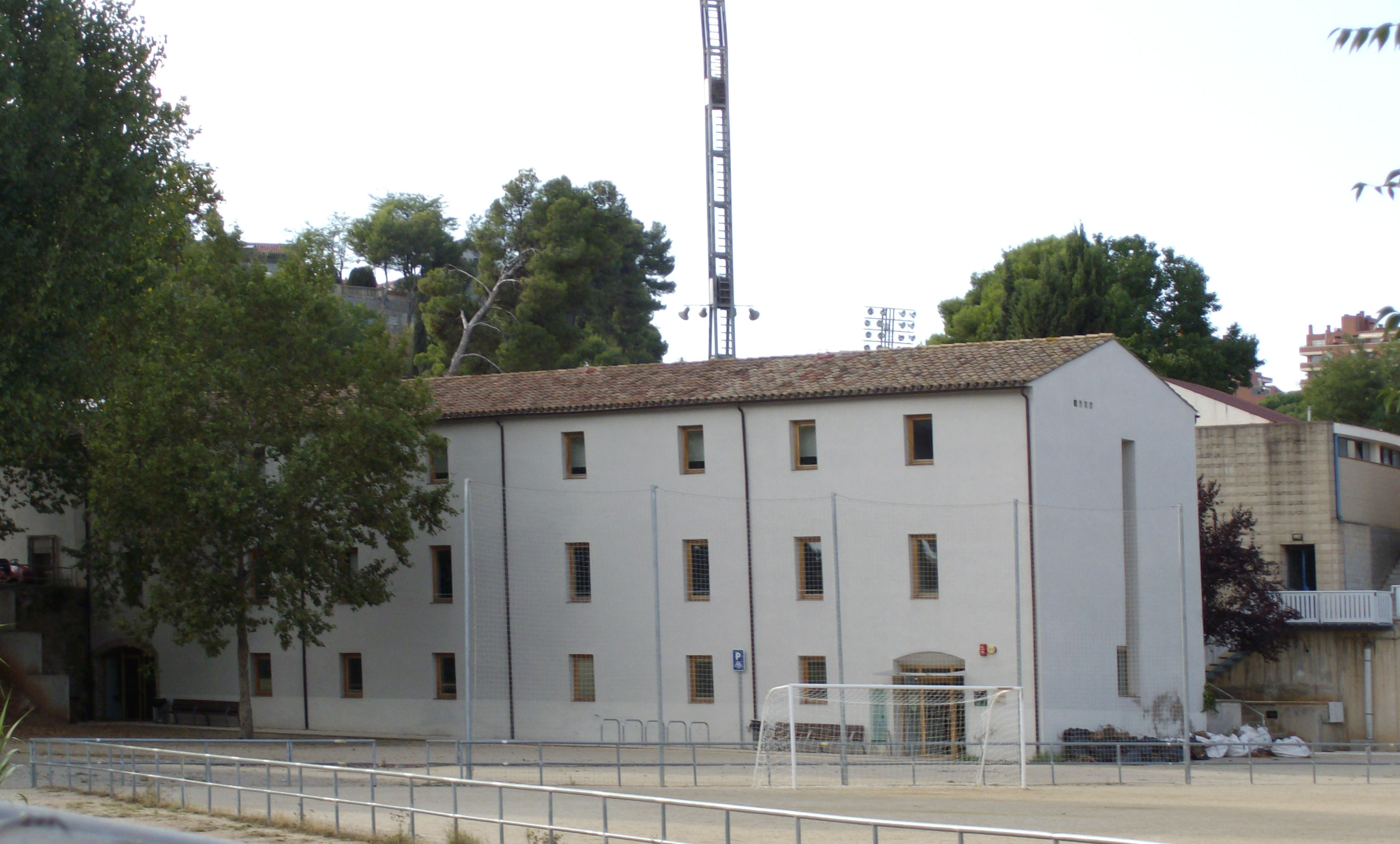 Molino de Sant Oleguer o Molino del Mas Verger. Antiguo molino hidráulico construido en el siglo XVIII, situado en el margen derecho del río Ripoll, dentro de las instalaciones del Complejo Deportivo de Sant Oleguer, en el camino de Can Quadres, 179, de Sabadell, Barcelona (España). El Ayuntamiento de Sabadell lo ha restaurado y lo ha reconvertido en un albergue juvenil.